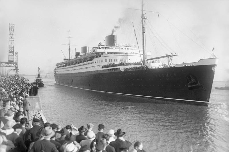 Das schnellste Schiff der Welt! Der Schnelldampfer "Bremen" des Norddeutschen Lloyd stellte einen neuen Weltrecord für die Strecke Bremen-New York mit 6 Tagen, 3 Stunden auf. Er verbesserte damit den Record des Lloyddampfers "Europa" um 3 Stunden.